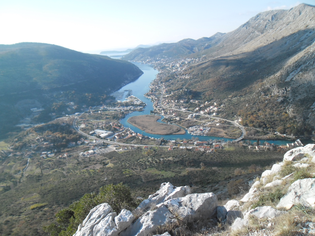 pogled s Golubova kamena na Rijeku dubrovačku 22. prosinca 2013.